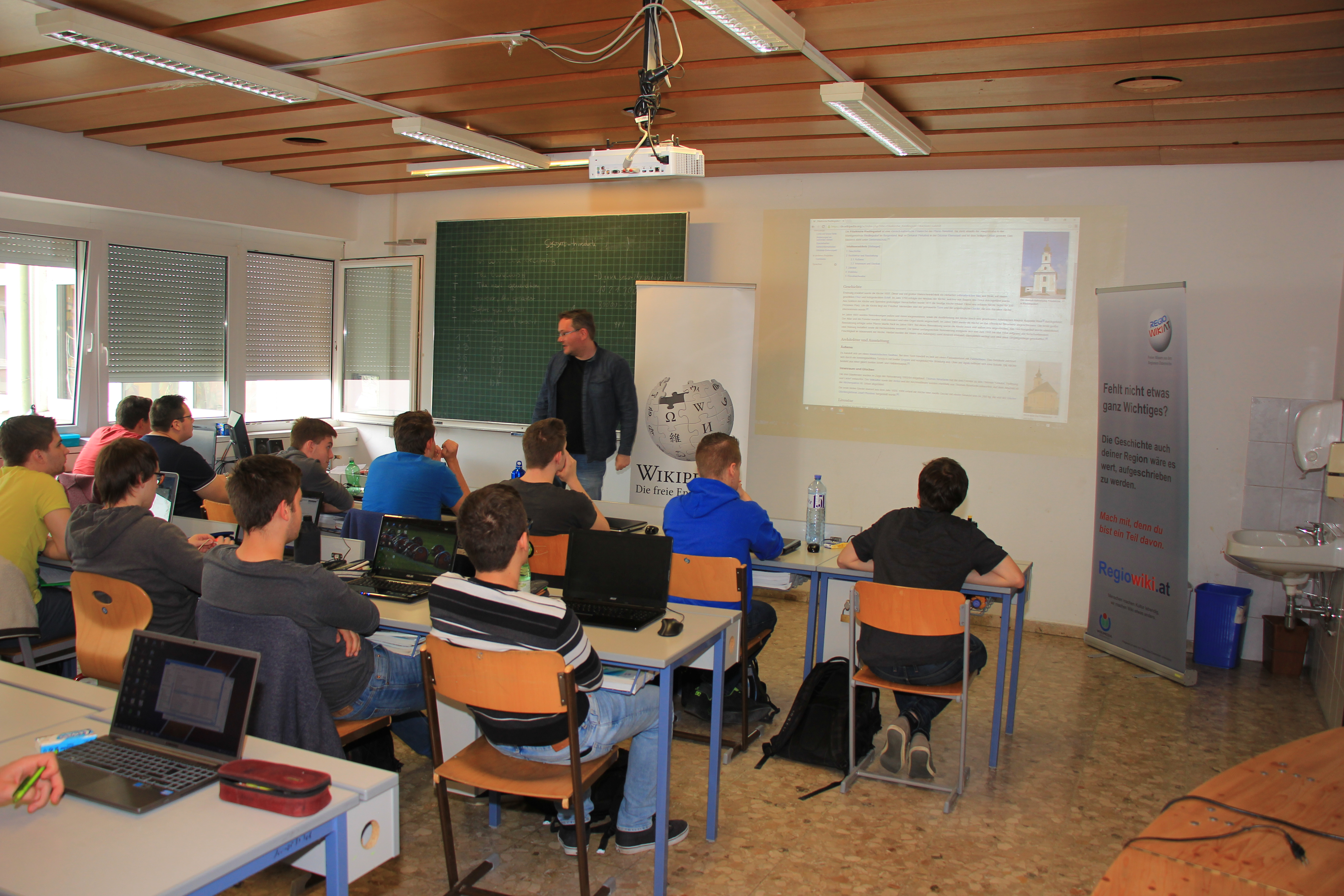 Edit-a-thon der Klasse 4AHIF mit Vertretern von Wikimedia Austria.